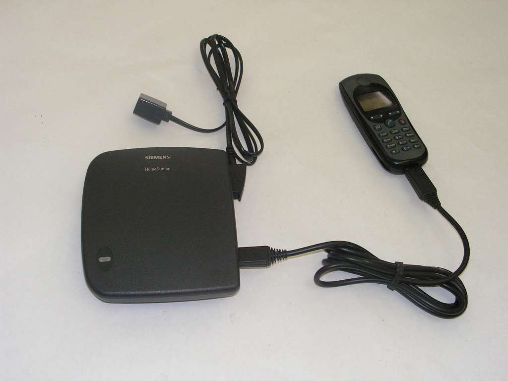 Siemens Homestation. Author: Lzur